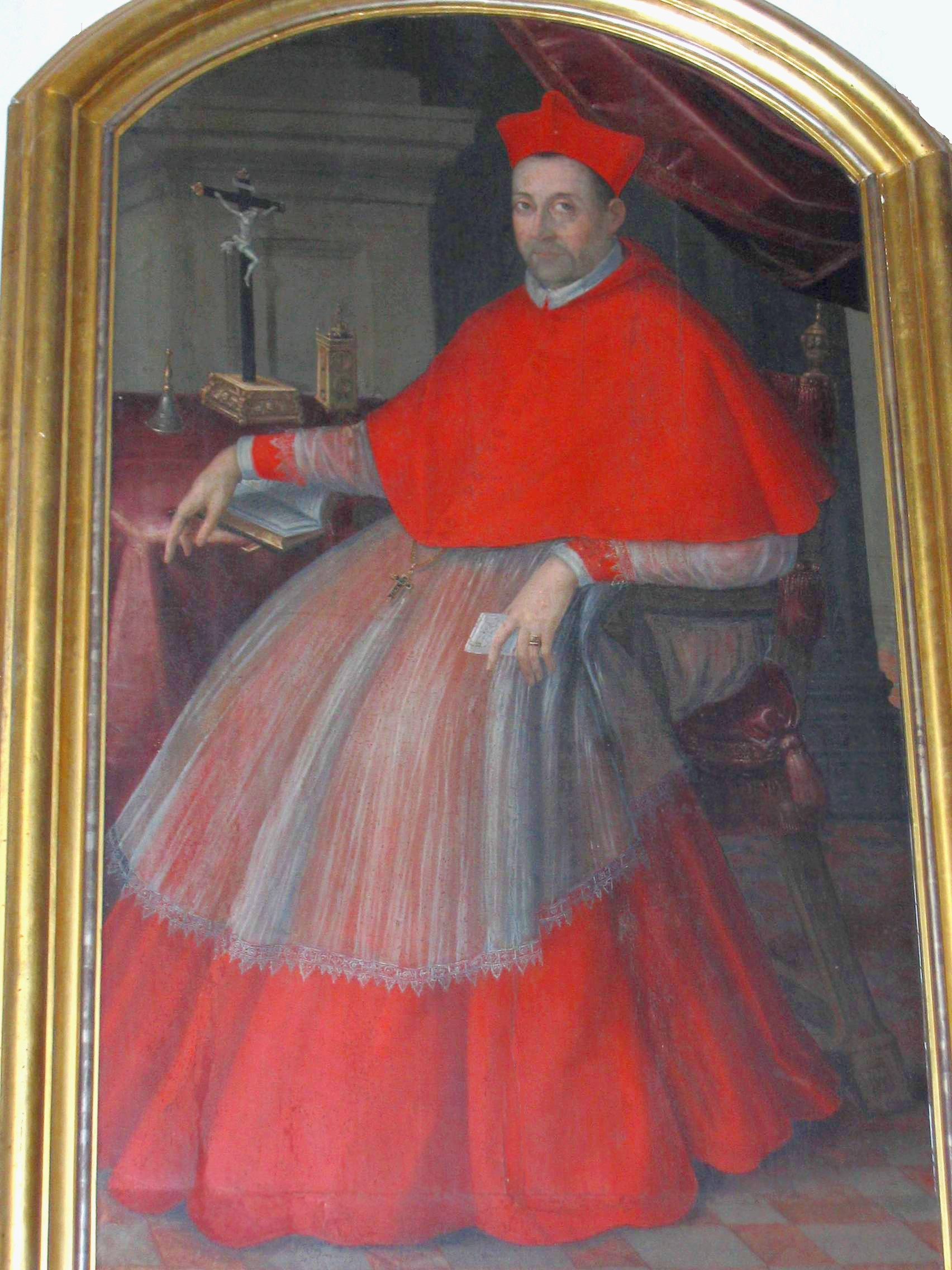 Jerzy Radziwiłł Bishop of Kraków, anonymous portrait of XVII century image taken by user:Mathiasrex Maciej Szczepańczyk